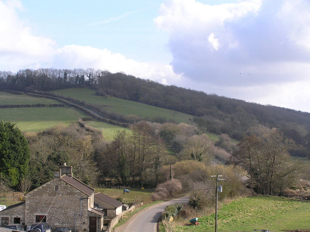 Hinton Hill